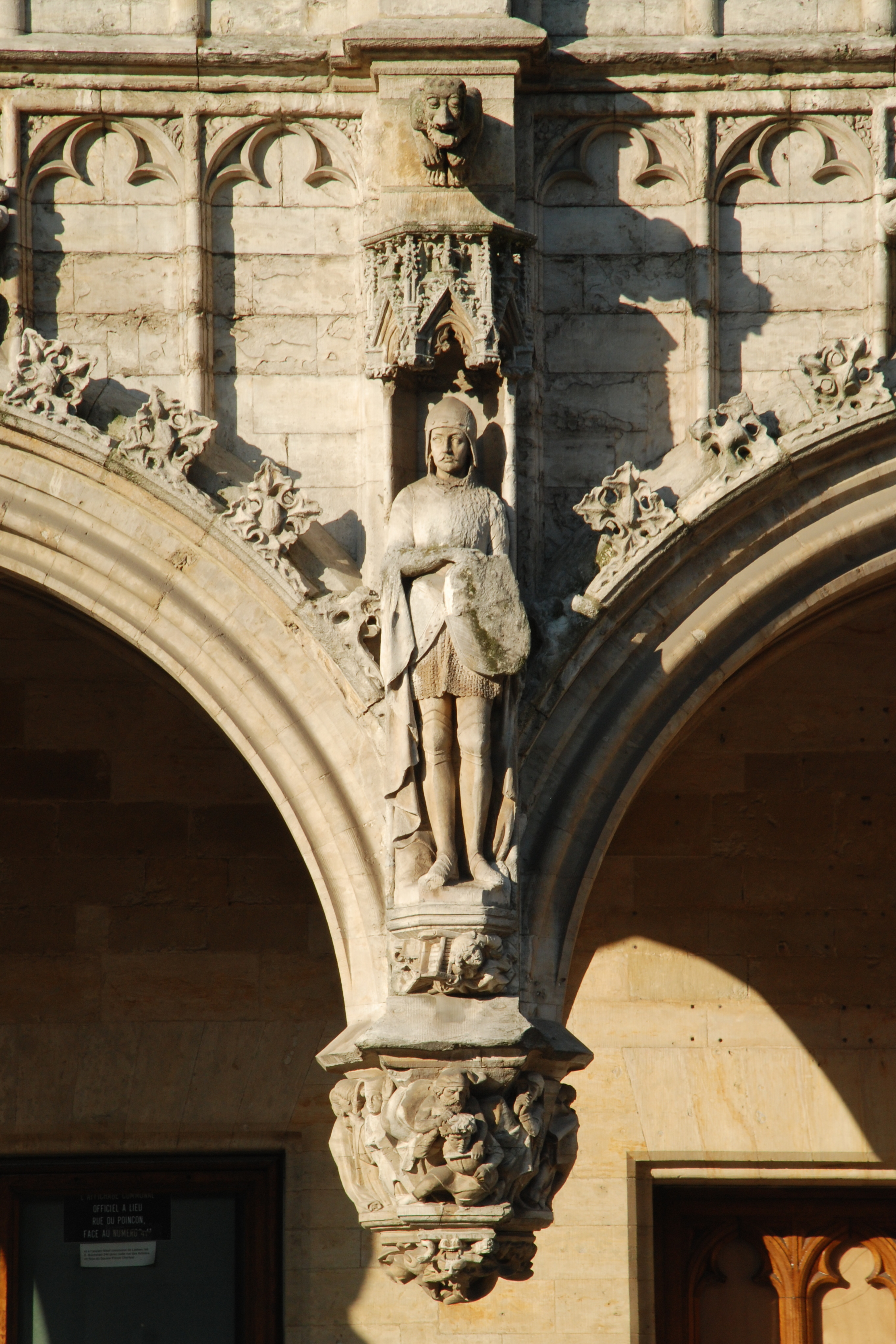 Belgique - Bruxelles - Hôtel de ville de Bruxelles